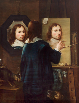 Self-portrait